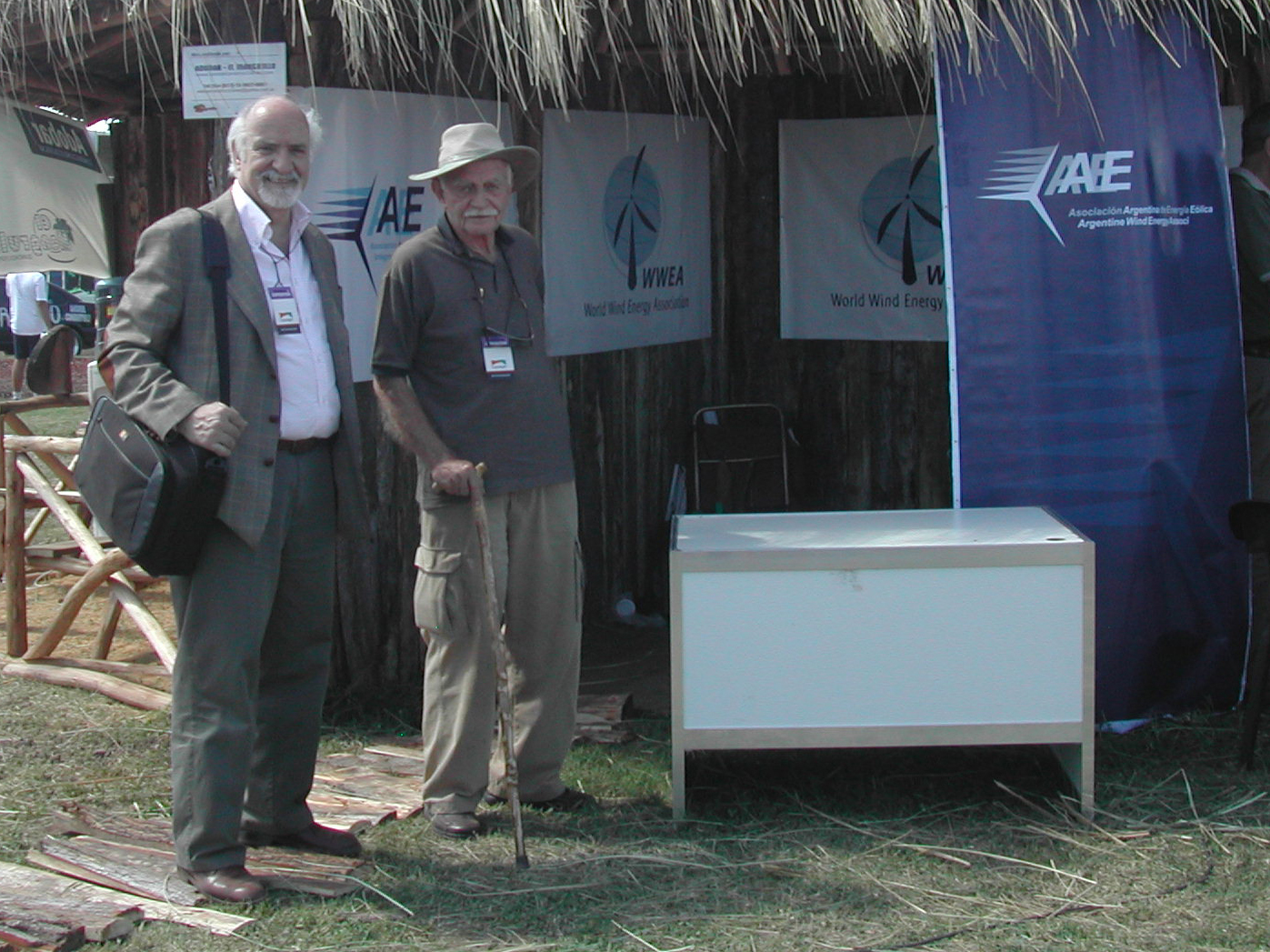 Erico Spinadel in International Fair